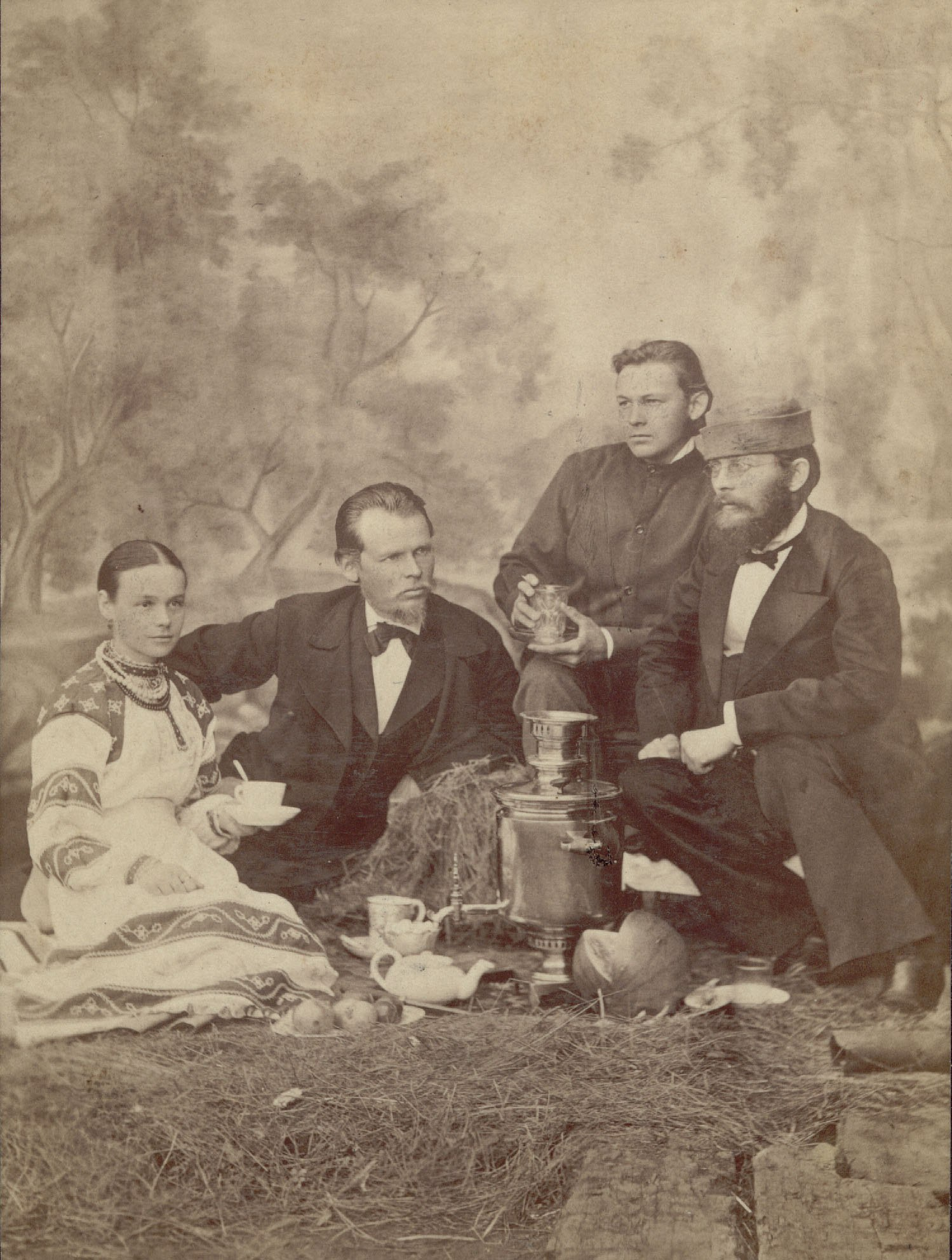 Братья Кривощёковы Николай и Дмитрий, Иван с супругой Добрянский завод 1885 г.